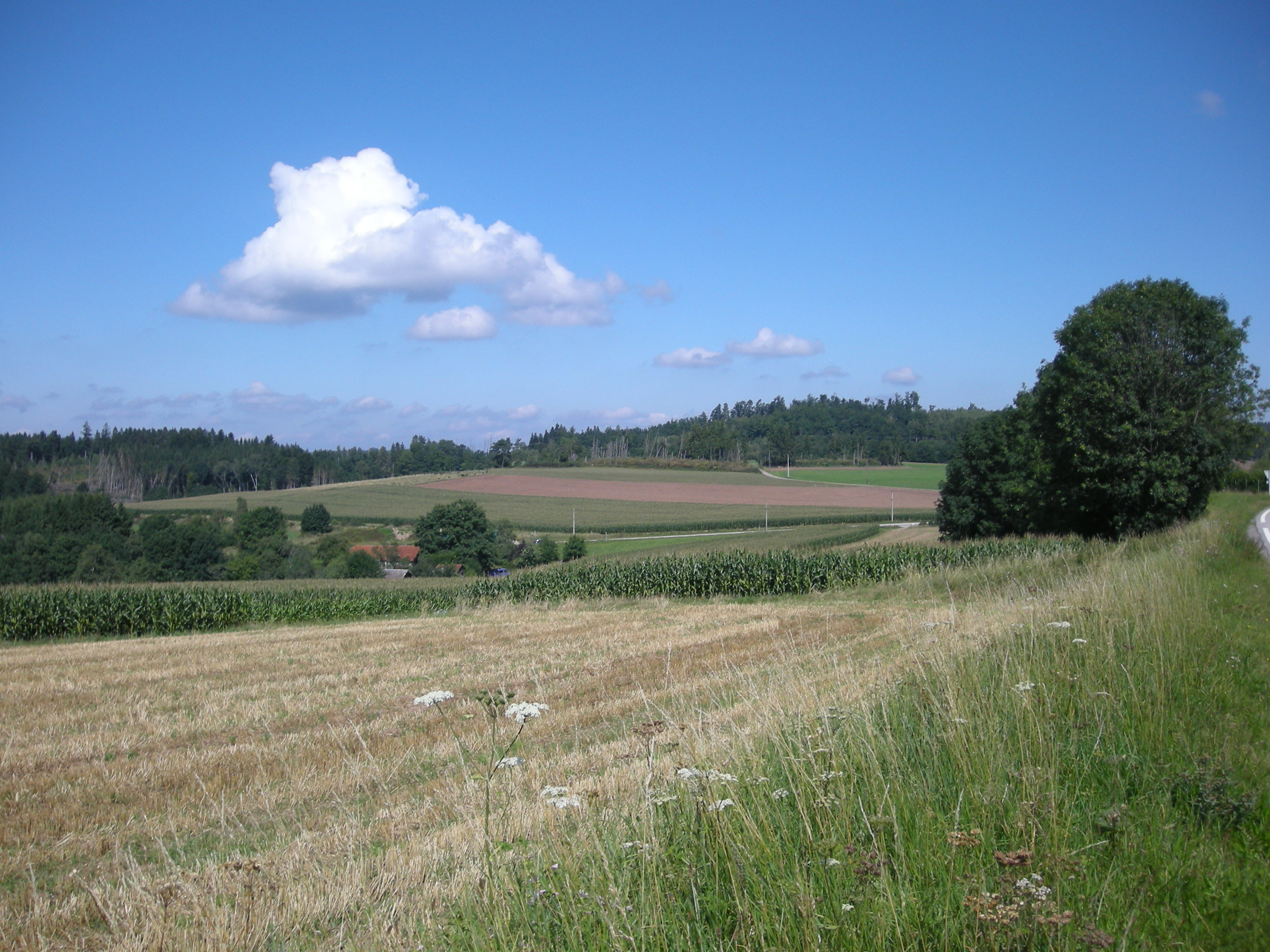 Col du Plafond (Vosges). Vue en direction de Corcieux.